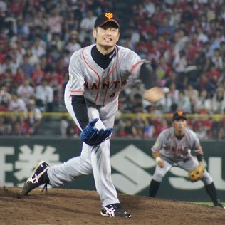 Giants_aoki43